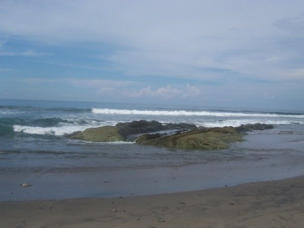 Pantai Liwung Pireng, Desa Kolidetung